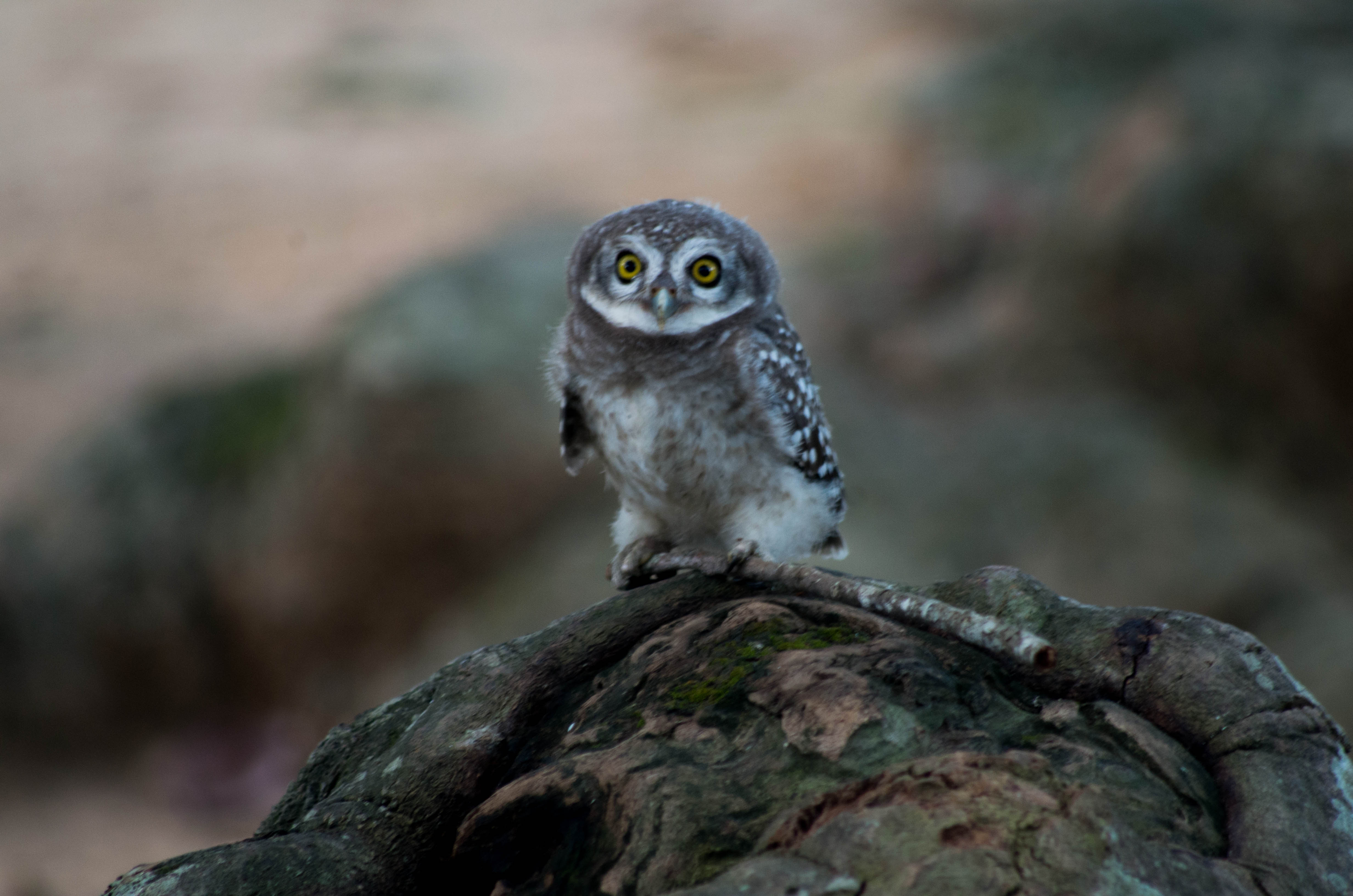 Trà Vinh được xem là thành phố ẩn trong rừng cây.Nơi đây,có nhiều kỳ thú về danh lam thắng cảnh như Ao Bà Om,Chùa Cò, Cây Dầu Dù... rất hoang dã gắn liền với truyền thuyết văn hóa của người Khơ Me Nam Bộ.Du lịch nơi đây,Bạn cứ mặc nhiên khám phá ...chẳng bị ai làm phiền , chẳng tốn chi phí bao nhiêu.Còn chất lượng và giá trị thì còn tùy theo cảm nhận...